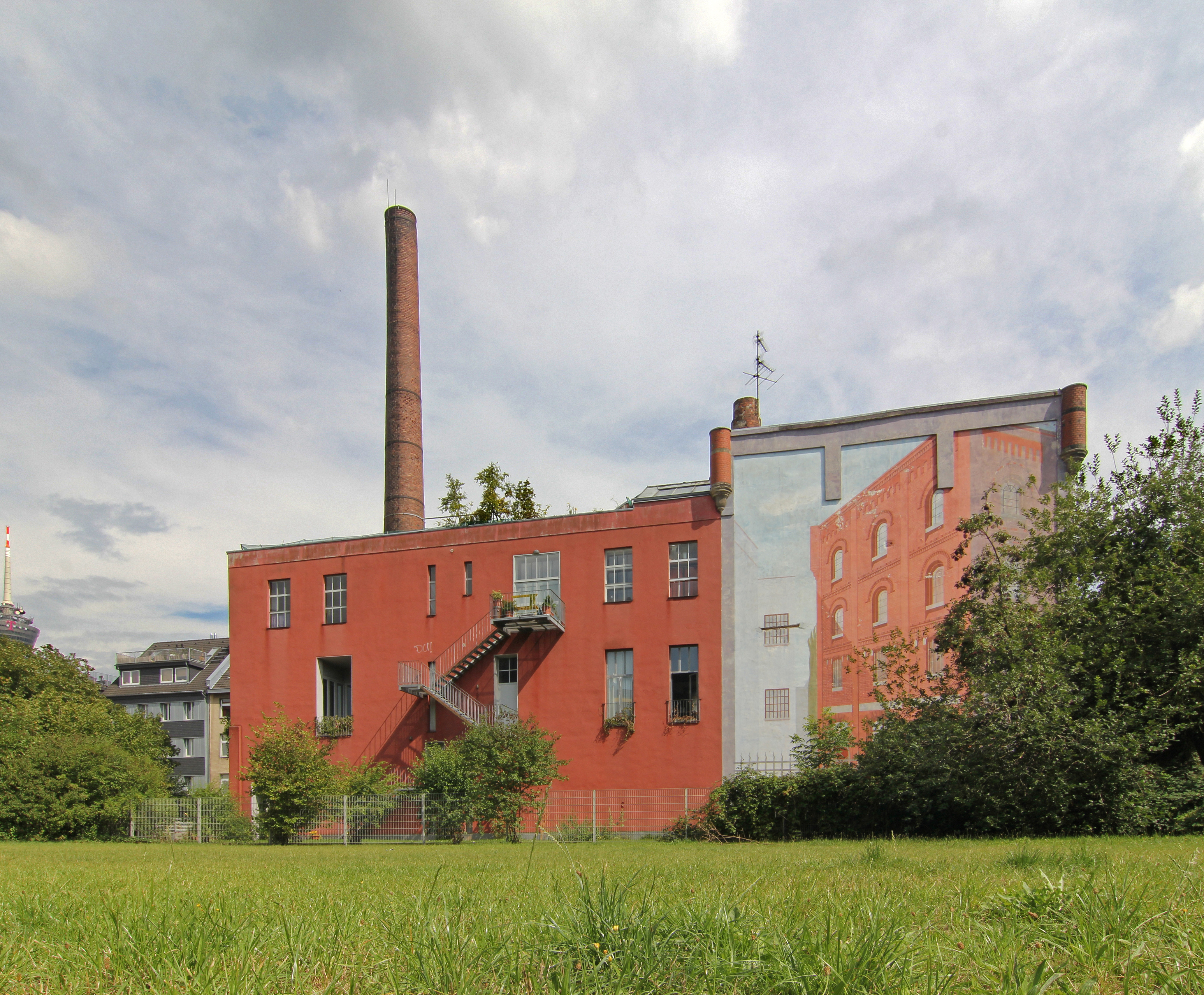 Kwatta-Fabrik, technisches Denkmal, Roßstr.12-16, Köln-Ehrenfeld